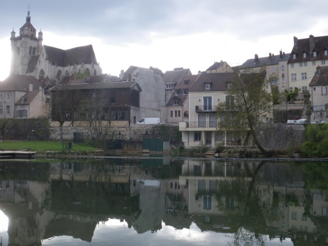 Vido de Dole